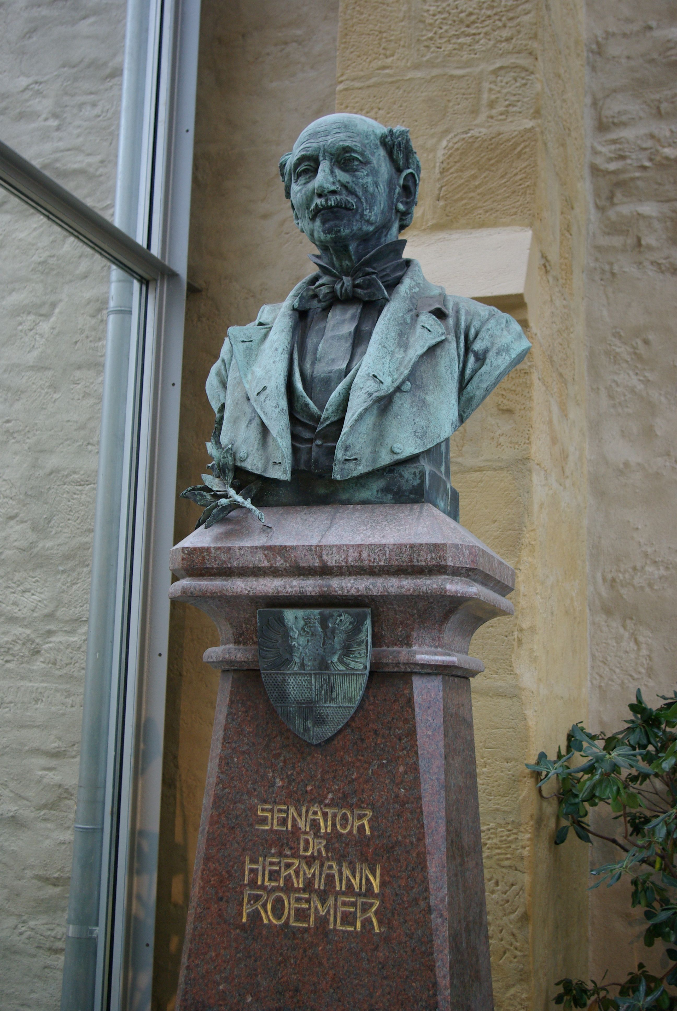 Senator Dr. Hermann Roemer, Senator in Hildesheim, Mitbegründer des Roemer- und Pelizaeus-Museum in Hildesheim, Büste im Museum